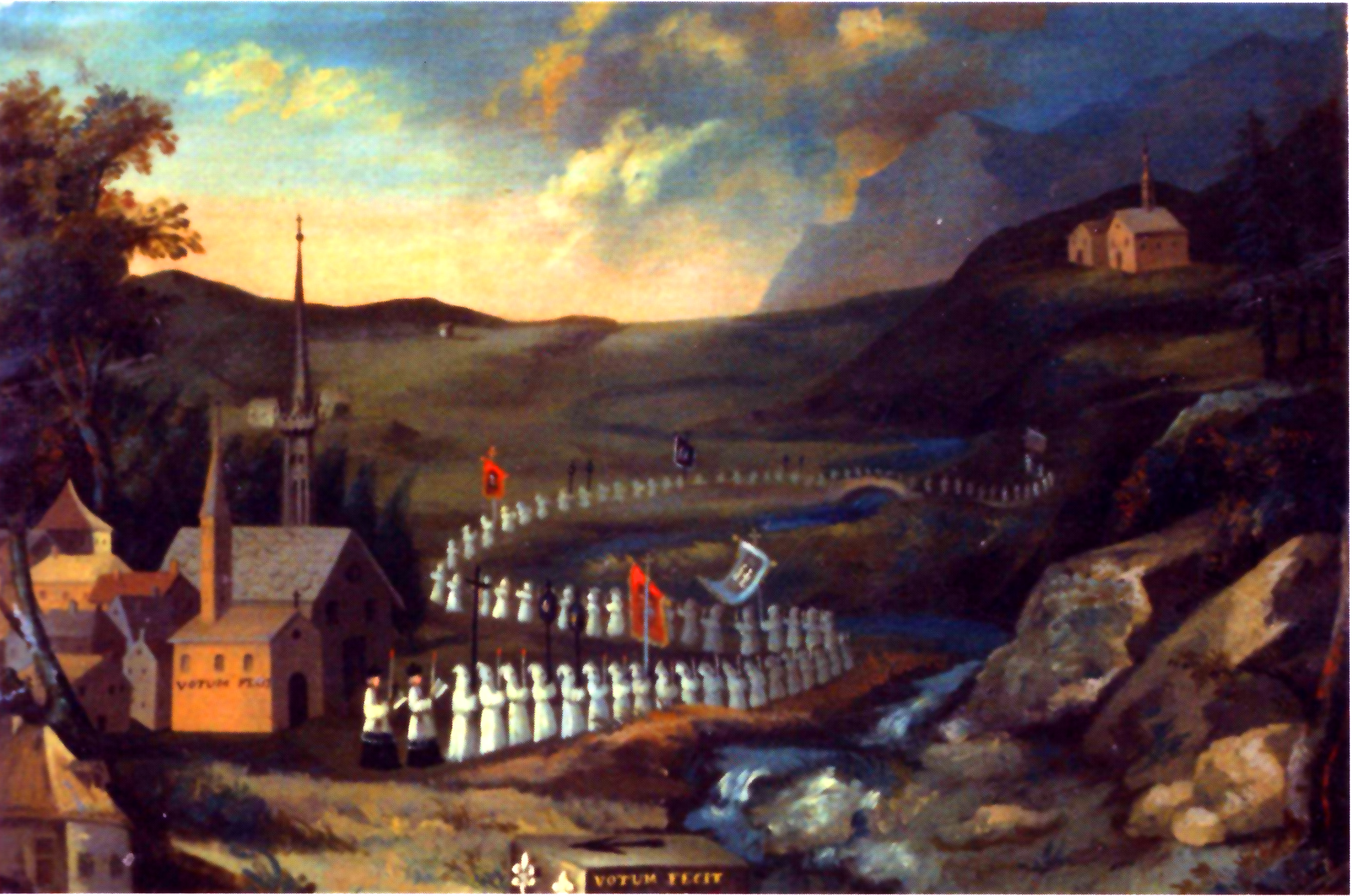 Ex-voto du pèlerinage des fidèles de Reillanne à Notre-Dame de Lure, milieu du XIXe siècle